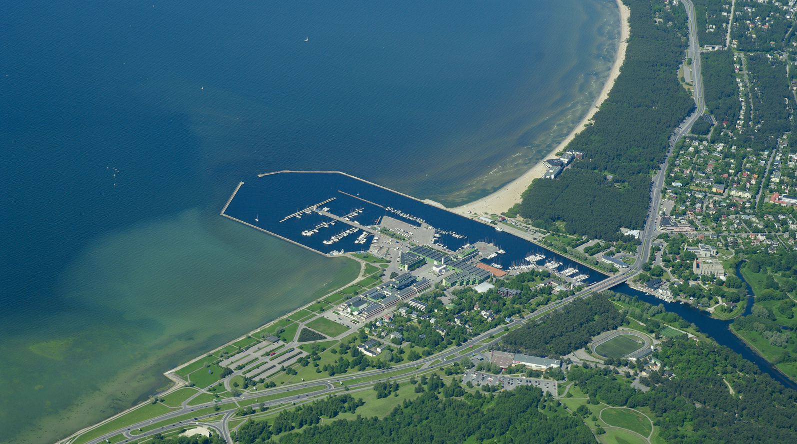 Õhuvaade Pirita asumile